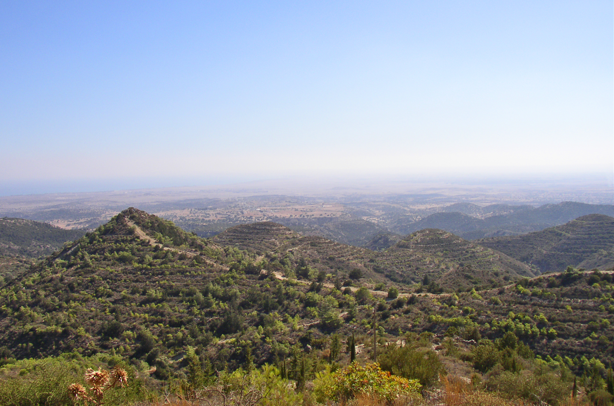 Blick auf die Mesarya-Ebene. Aufgenommen auf der Straße von Salamis nach Kantara (Nord Cypern) 2003